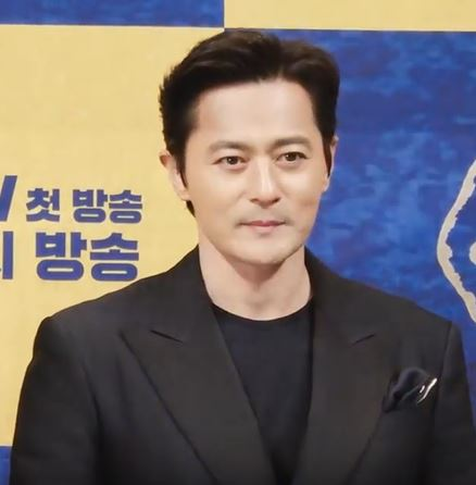 tvN 주말드라마 ‘아스달 연대기’(연출 김원석/극본 김영현, 박상연)제작발표회가 28일 오후 서울 강남구 논현동 임피리얼팰리스에서 열렸다.